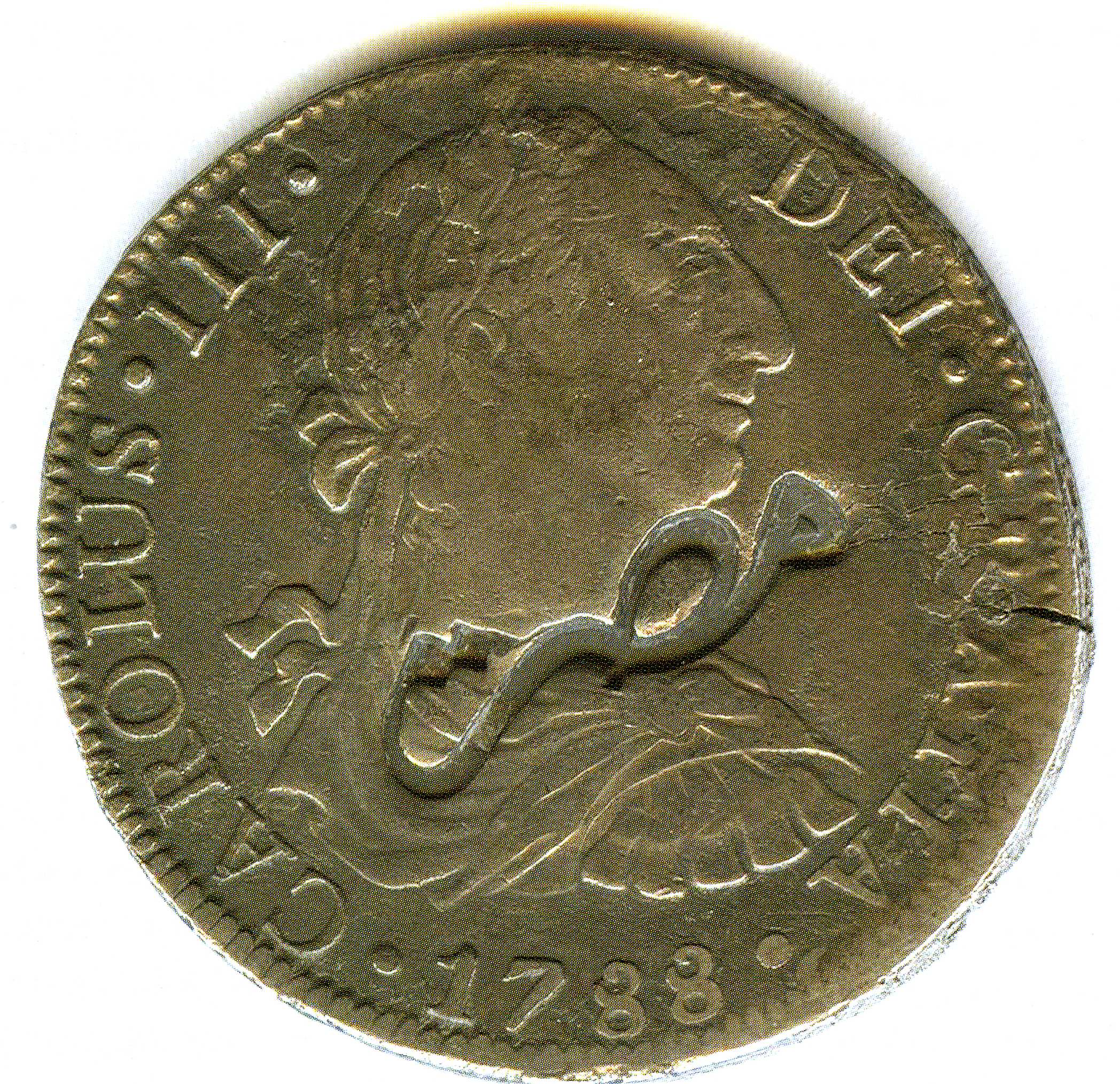 Moneda española de Carlos III utilizada en Egipto (ﻣﺼﺮ)